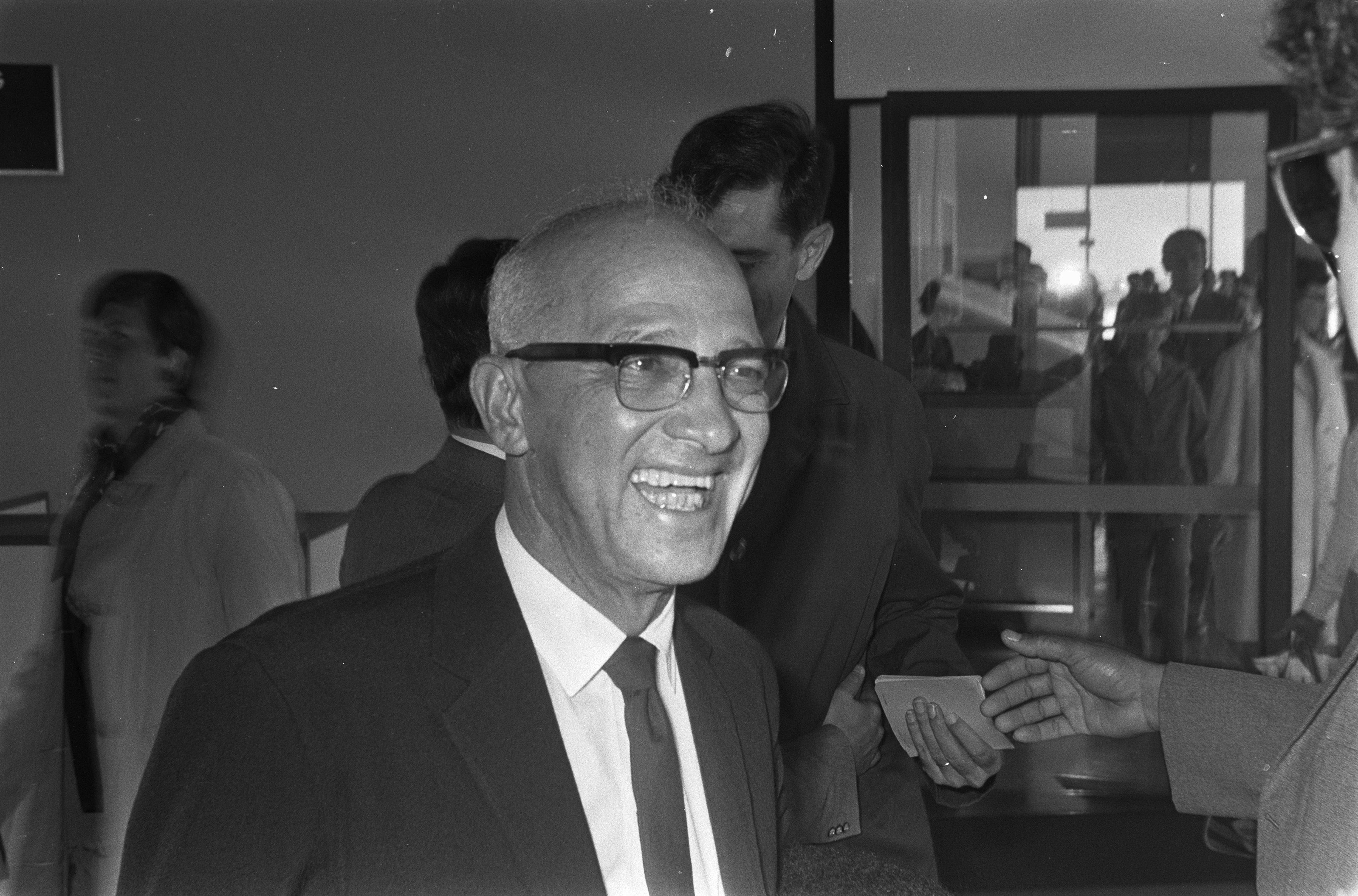 Collectie / Archief : Fotocollectie Anefo Reportage / Serie : [ onbekend ] Beschrijving : Nieuwe minister van financien van Suriname E. Wijngaarde arriveert op Schiphol, kop Datum : 10 april 1969 Trefwoorden : aankomsten, ministers Persoonsnaam : WIJNGAARDE E. Fotograaf : Evers, Joost / Anefo Auteursrechthebbende : Nationaal Archief Materiaalsoort : Negatief (zwart/wit) Nummer archiefinventaris : bekijk toegang 2.24.01.05 Bestanddeelnummer : 922-2846